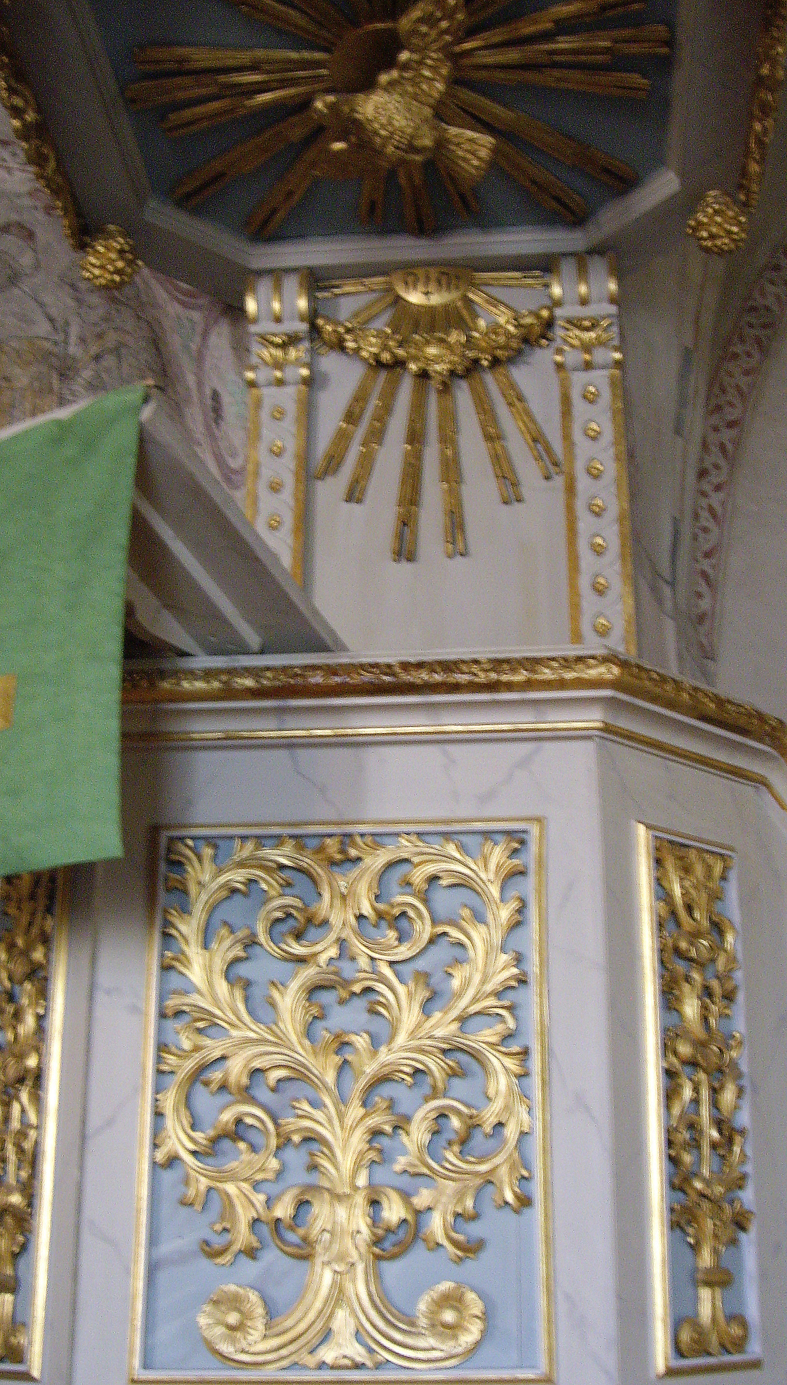 Predikstol från 1716 med tetragrammet JHWH i Almunge kyrka